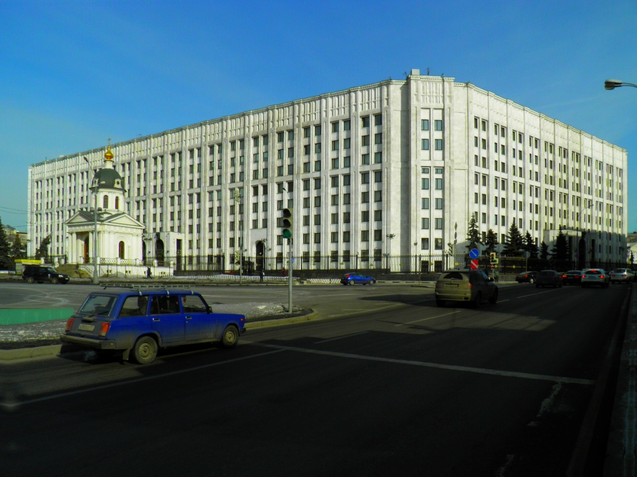 минОБОРОНЫ